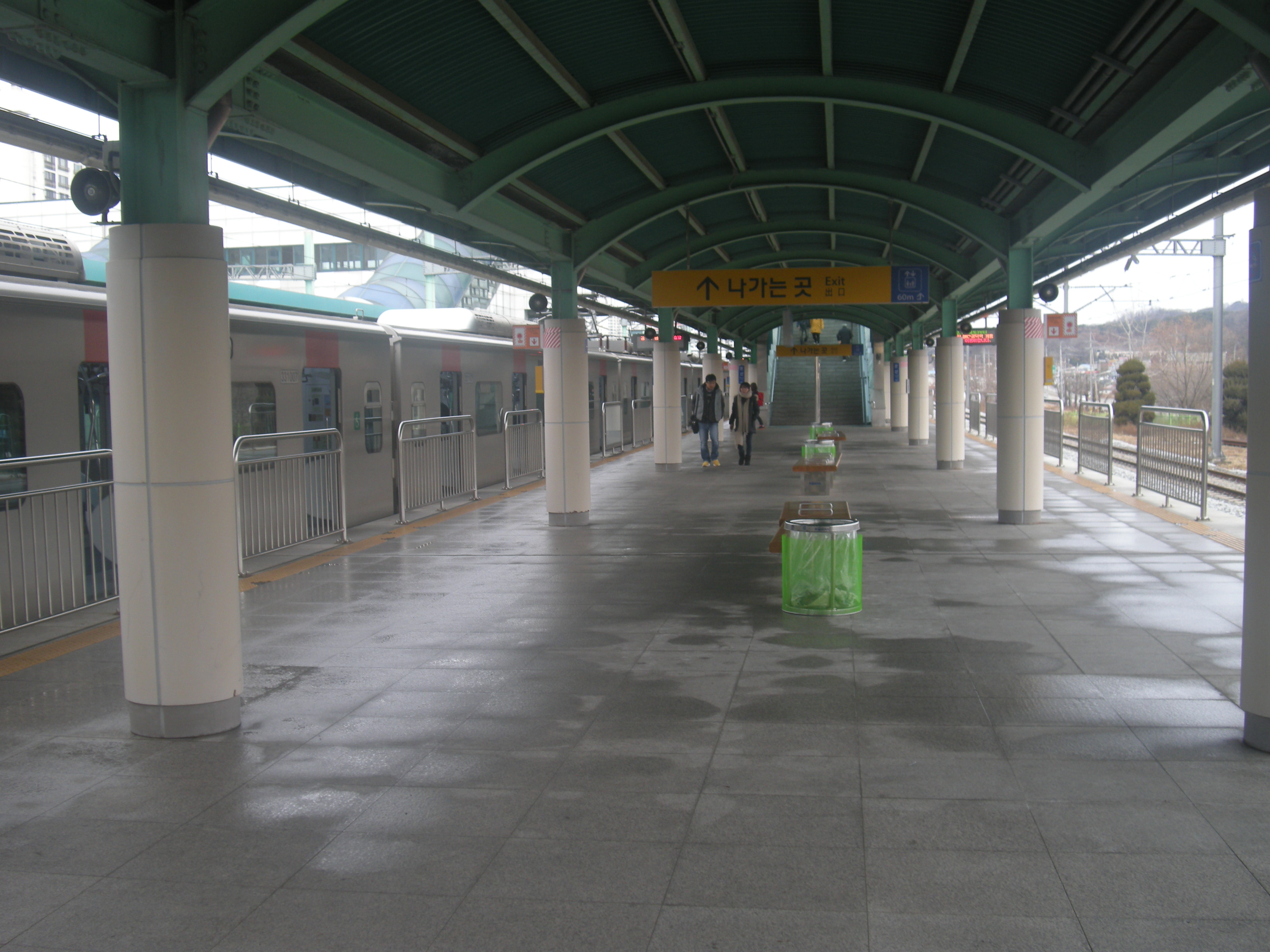 경의선 문산역 1·2번 승강장